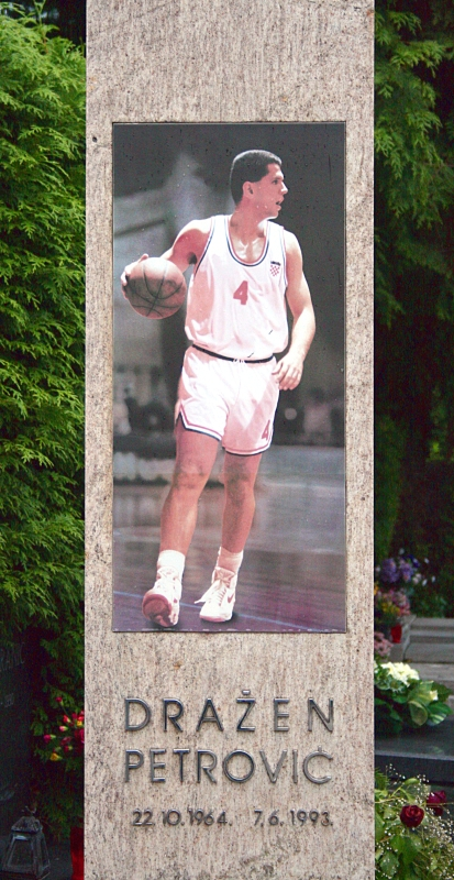 Grob Dražena Petrovića na Mirogoju u Zagrebu